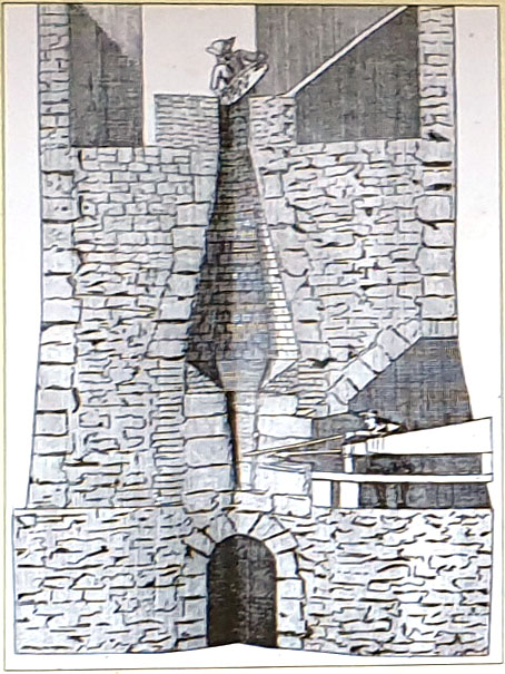 historische Darstellung (Kupferstich) des Hohgen Ofens